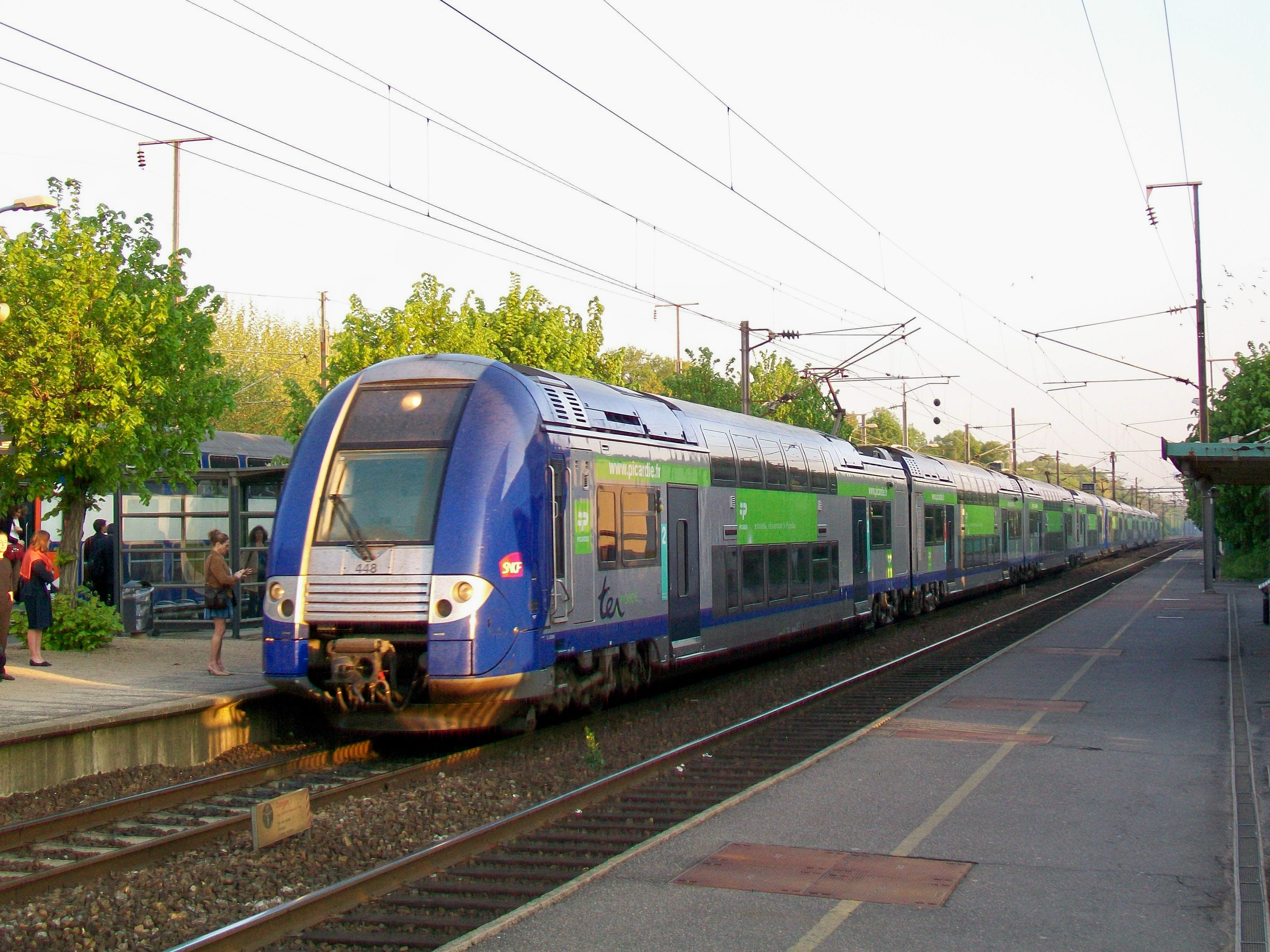 Le TER 848506, départ pour Paris à 7 h 37, assuré en UM de Z 26500 de la Région Picardie. Ce train part toujours du quai central habituellement réservé au RER, pour motif de dépassement par l'Intercités 12006 sans arrêt qui emprunte la voie 2 en face.